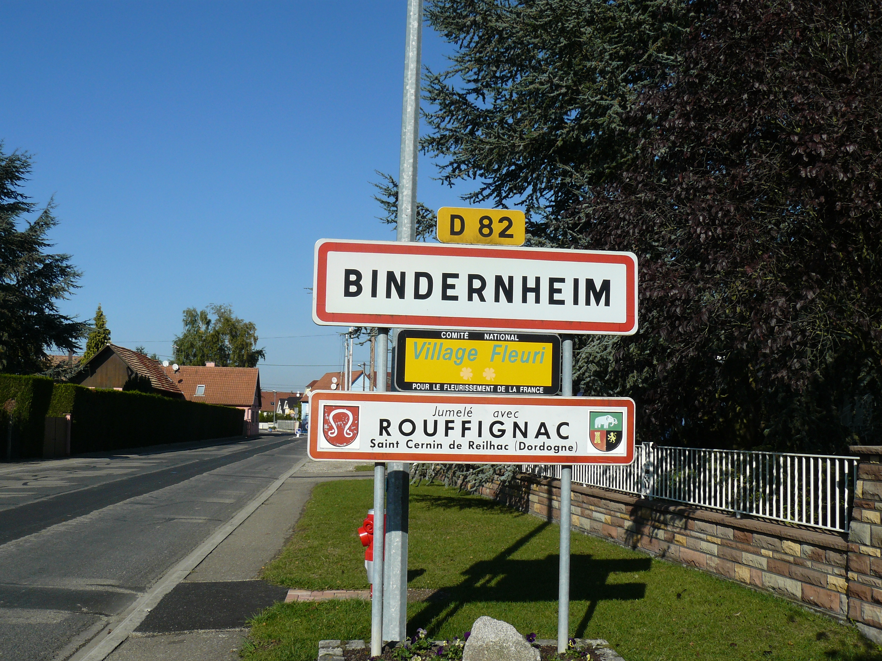 Entrée du village de Bindernheim